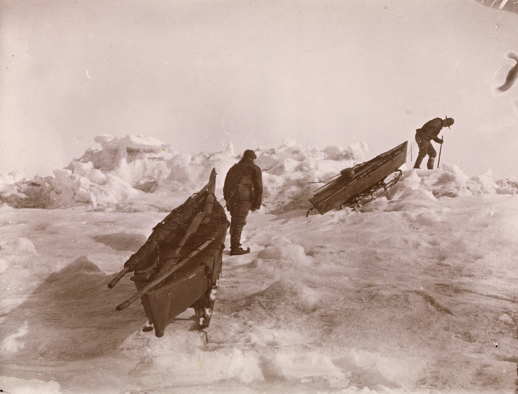 Fridtjof Nansen og Fredrik Hjalmar Johansen trekker kjelkene over den ujevne isen. Ett av bildene fra ekspedisjonen med polarskip mot Nordpolen i perioden 24 juni 1893 til 13 august 1896. Etter planen skulle skipet drive i isen med havstrømmer fra Sibirkysten over Nordpolen mot Grønland. I mars 1895 foretok Fridtjof Nansen sammen med en ledsager en hasardiøs skiferd med hundesleder i forsøket på å komme til polpunktet. Depicted person: Nansen, Fridtjof (1861-1930) Depicted person: Johansen, Fredrik Hjalmar (1867-1913) Depicted place: Polhavet